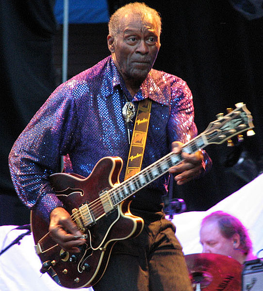 Chuck Berry in Brunnsparken, Örebro, Sweden.